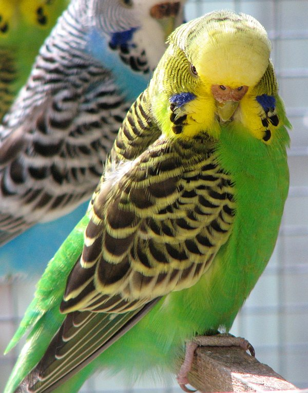 Melopsittacus undulatus